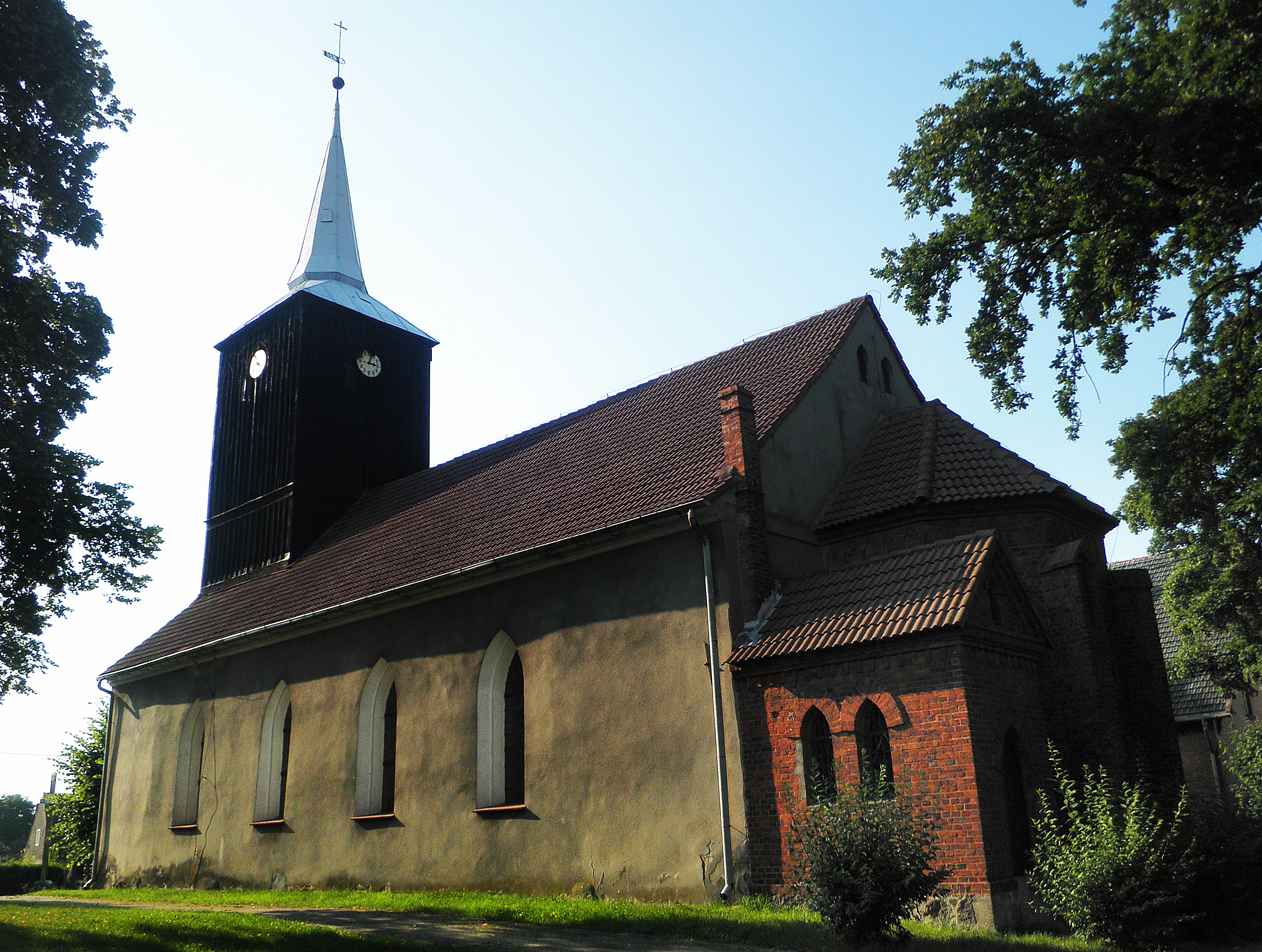 Stare Czarnowo - kościół MB Wspomożenia Wiernych, cmentarz przykościelny